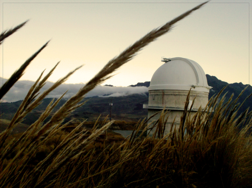 Observatorio Astronómico Nacional Llano del Hato ubicado en los predios de la población de Apartaderos del estado Mérida en Venezuela a una altura de 3.600 msnm convirtiéndolo en uno de los observatorios enclavados a mayor altura del mundo.